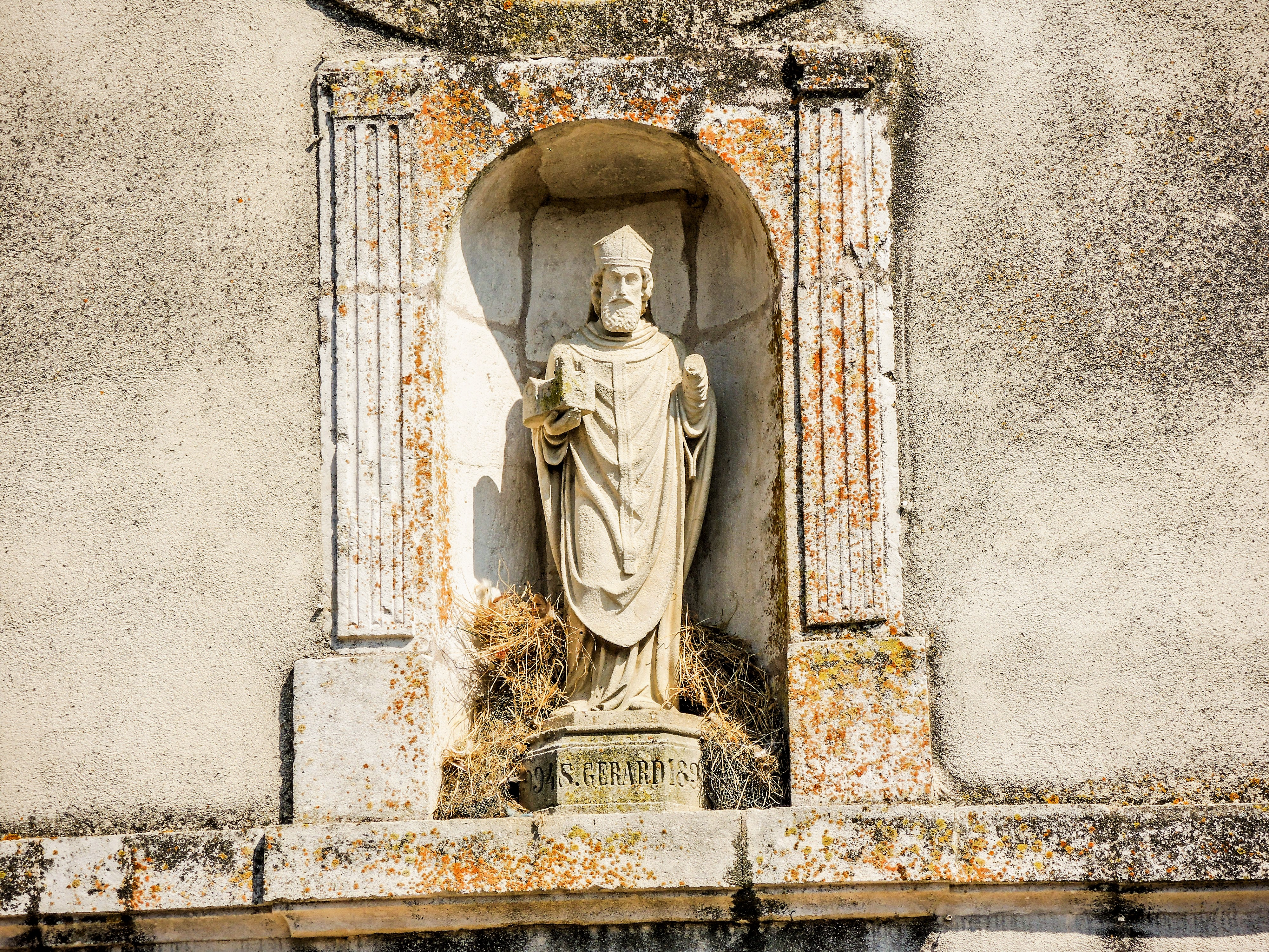 Statue de Saint-Gérard. Façade de l'église de Praye. Meurthe-et-Moselle